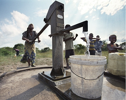 Ein Helvetas Trinkwasserbrunnen in Moçambique.